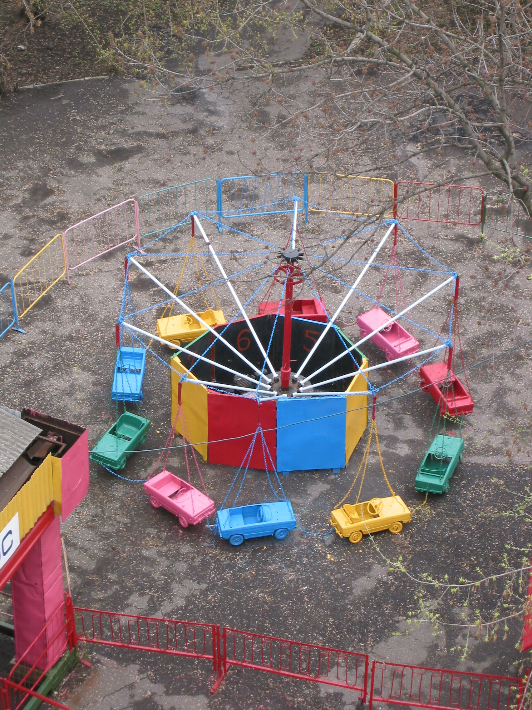 Парк Щербакова. Детский аттракцион